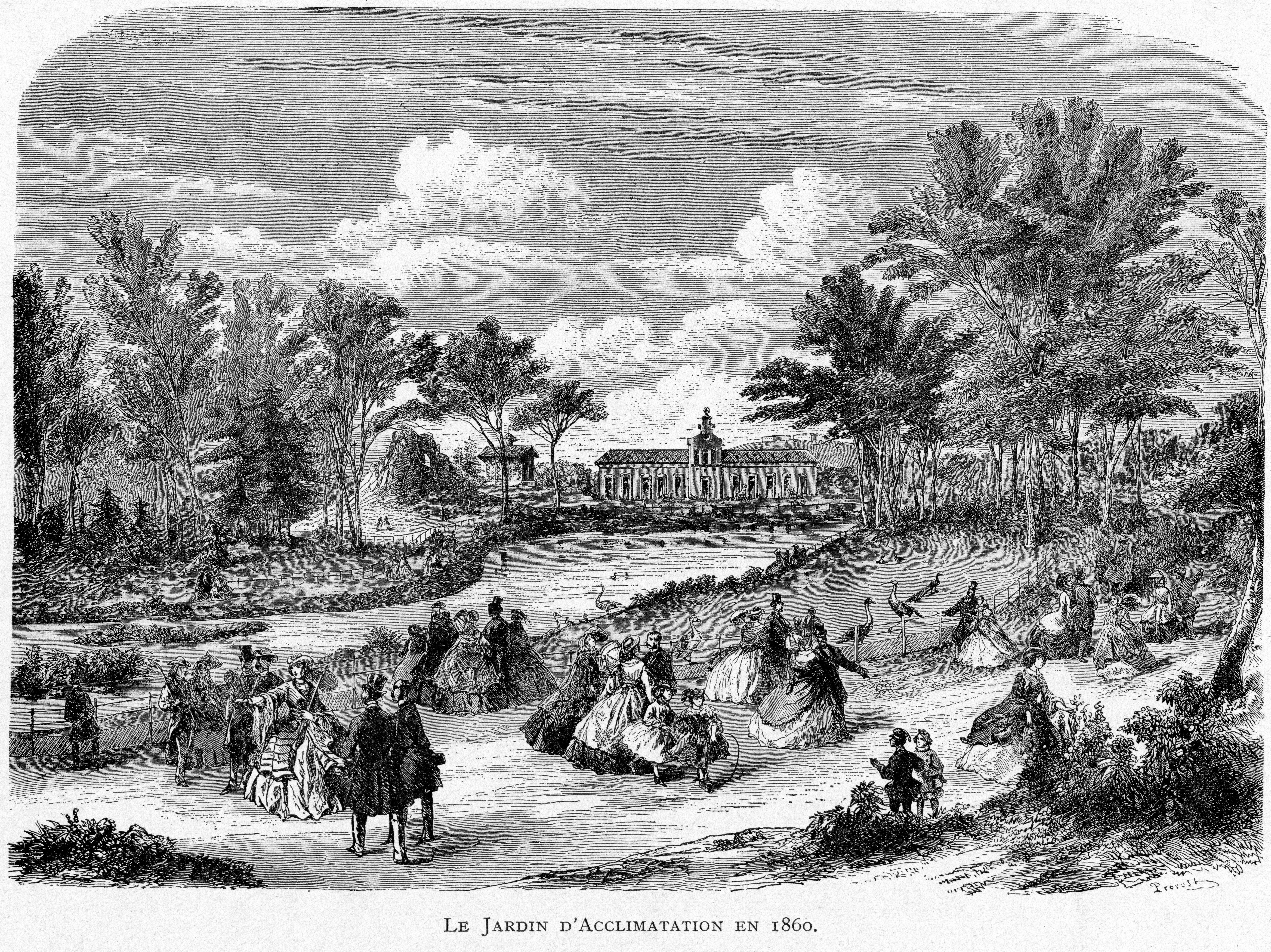 Corbel031 Le Jardin d'Acclimatation en 1860